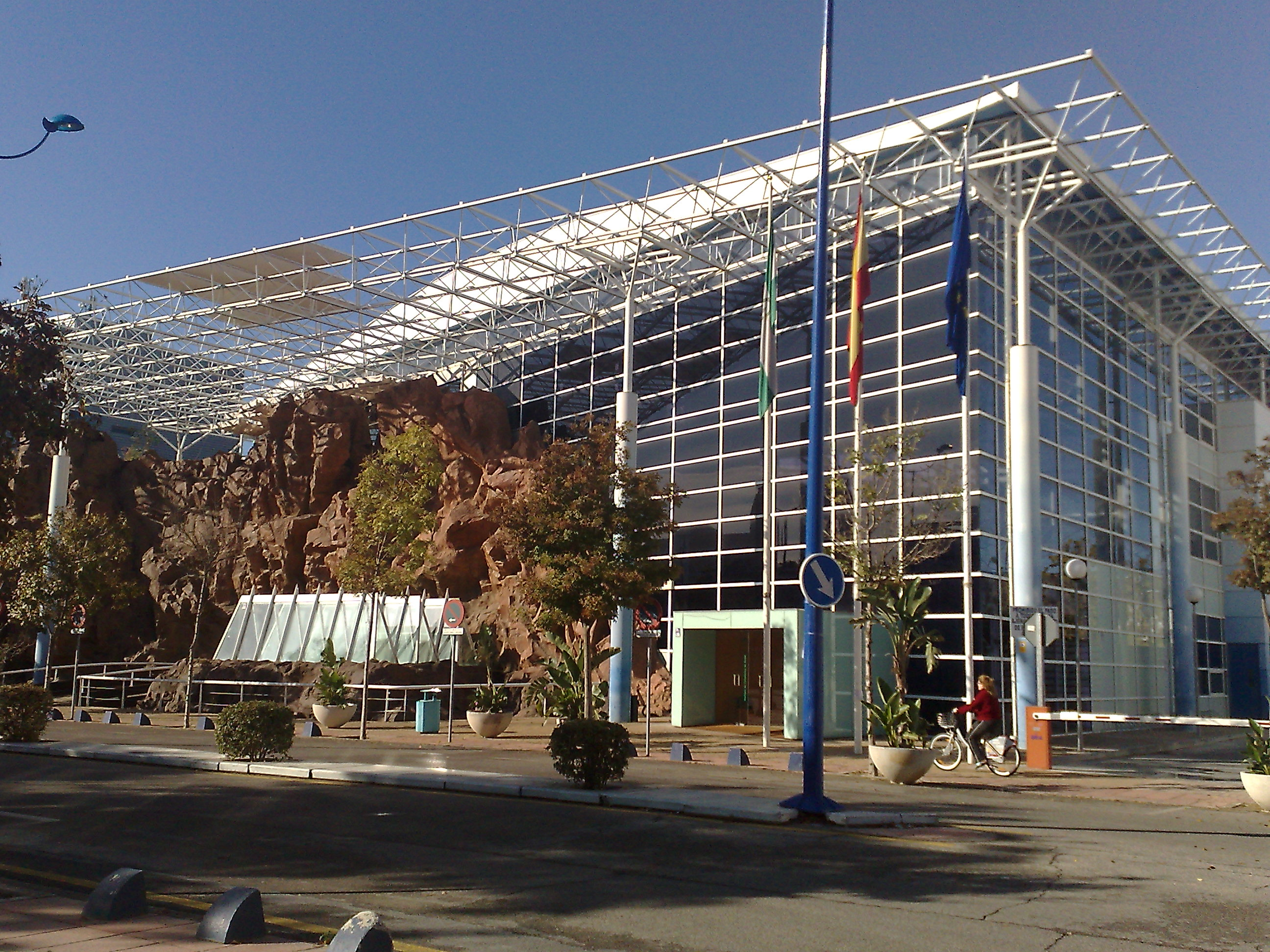 Fachada del edificio del Instituto de Estadística de Andalucía, en la Cartuja (Sevilla), situado en el antiguo pabellón de Nueva Zelanda en la Expo 92